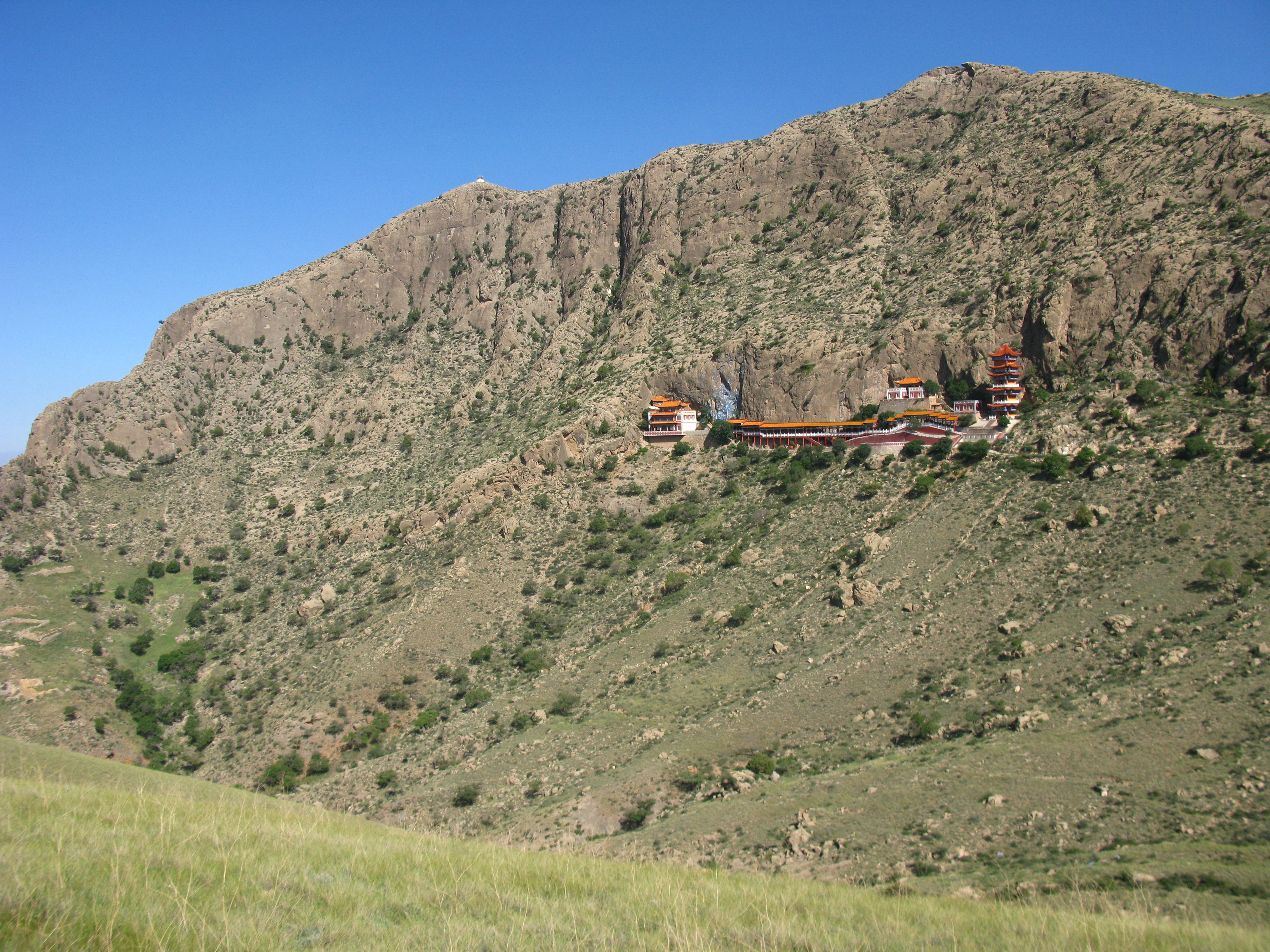 Hanging temple